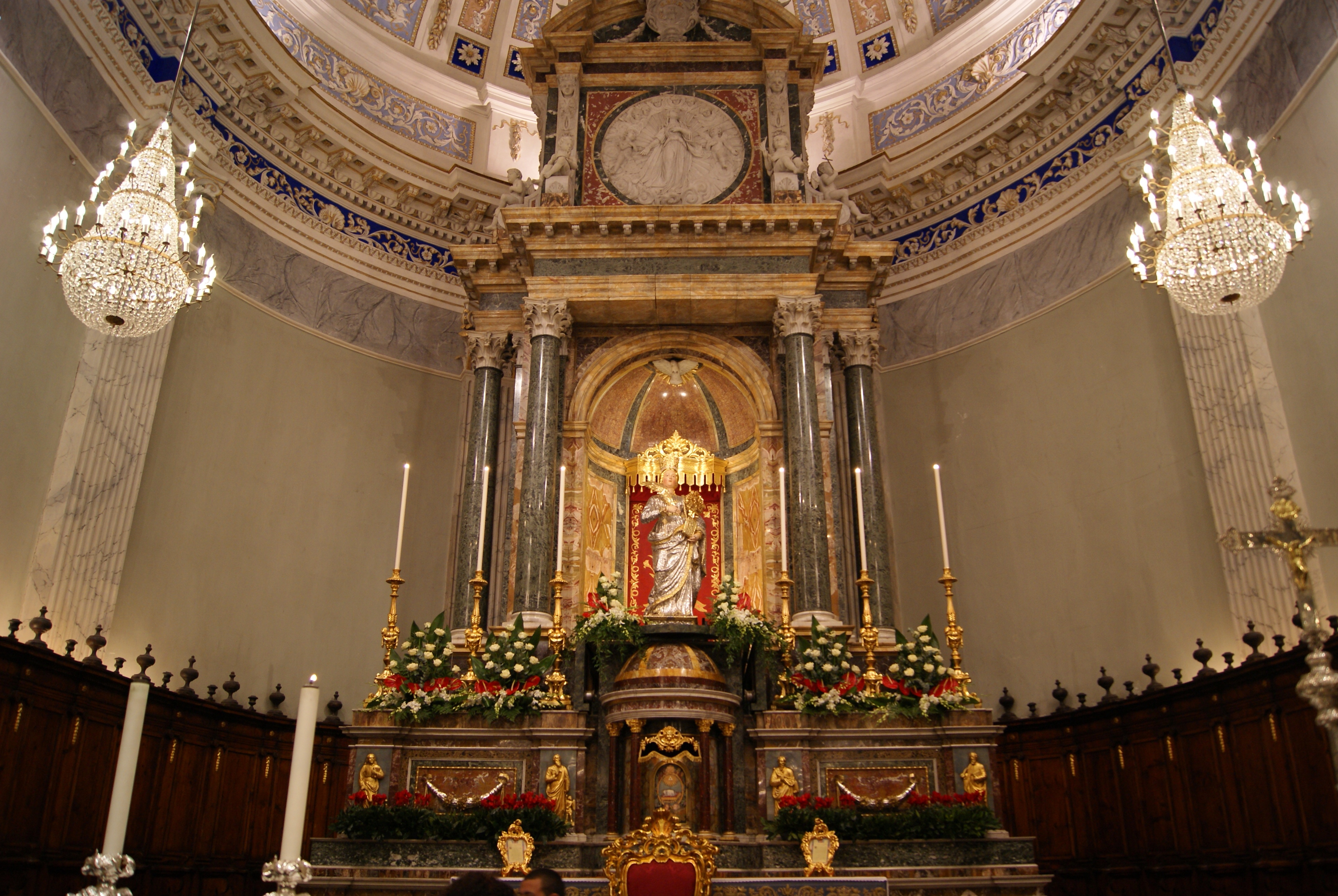 L'altare maggiore con il simulacro di Santa Barbara, svelato in occasione della riapertura della Chiesa il 17 novembre 2013